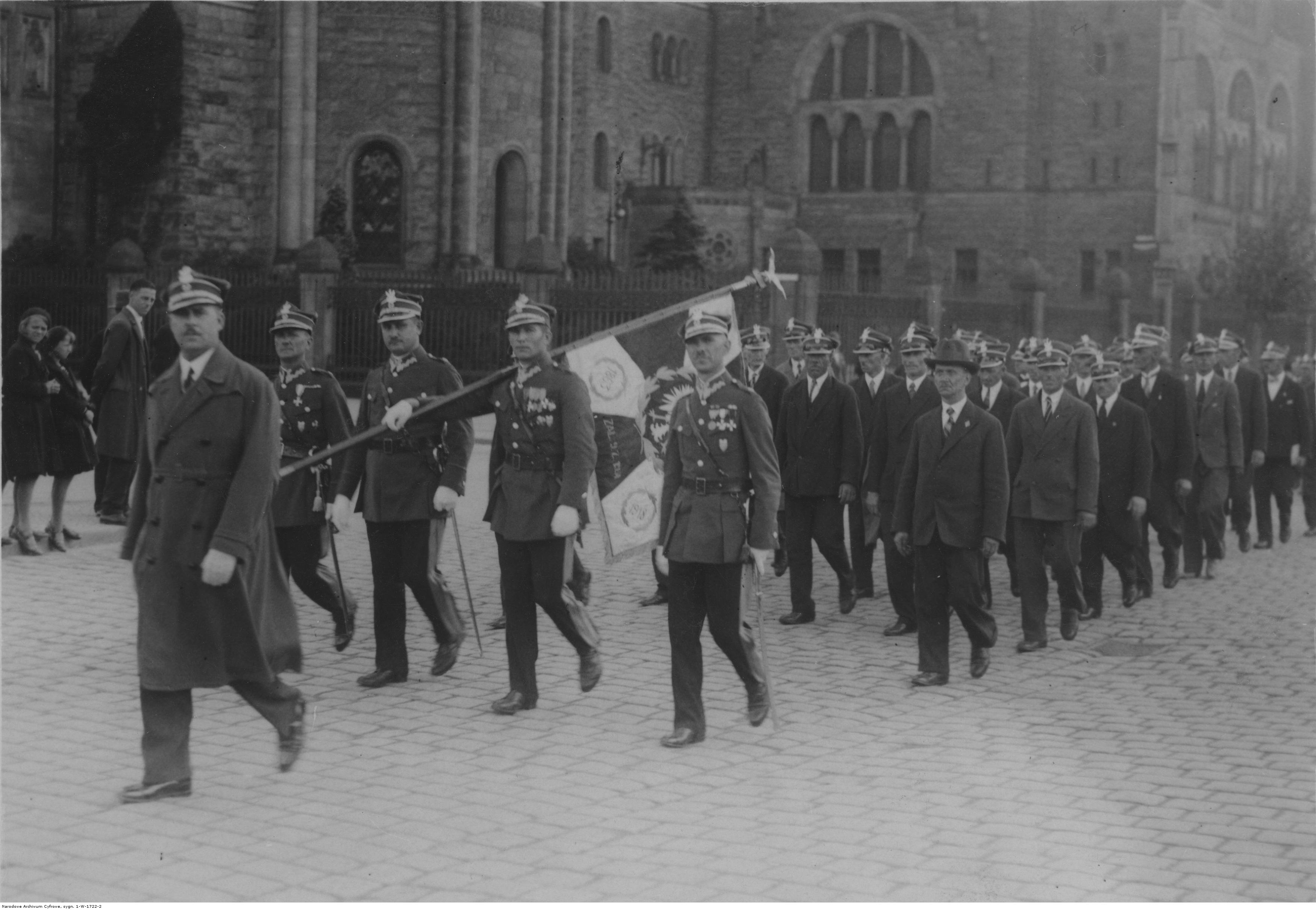 Święto 7 Batalionu Saperów w Poznaniu - defilada rezerwistów na ul. Święty Marcin. W tle Zamek Cesarski. Koncern Ilustrowany Kurier Codzienny - Archiwum Ilustracji. Sygnatura: 1-W-1722-2